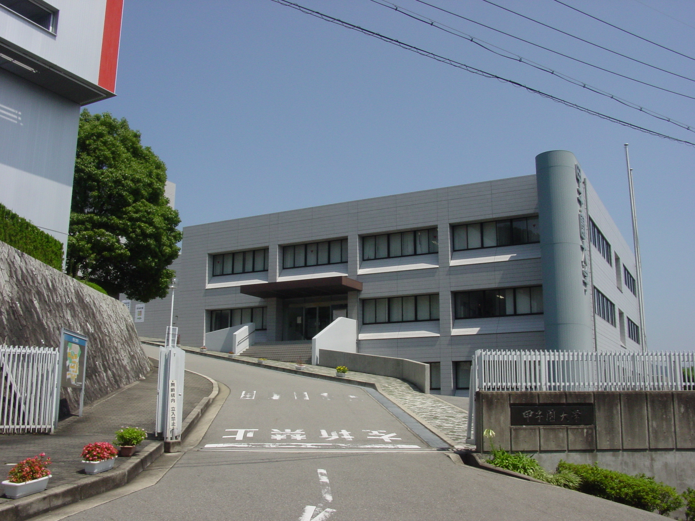 甲子園大学